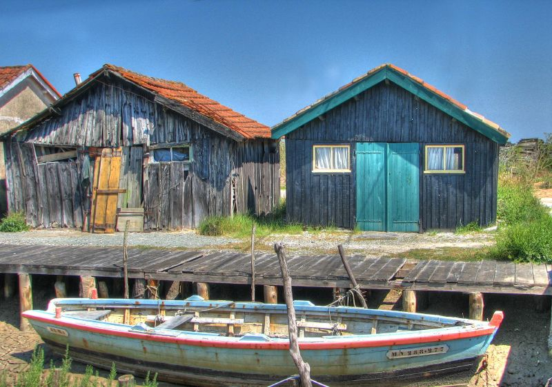 Cabanes Ostréicoles, Fort Royer HDR